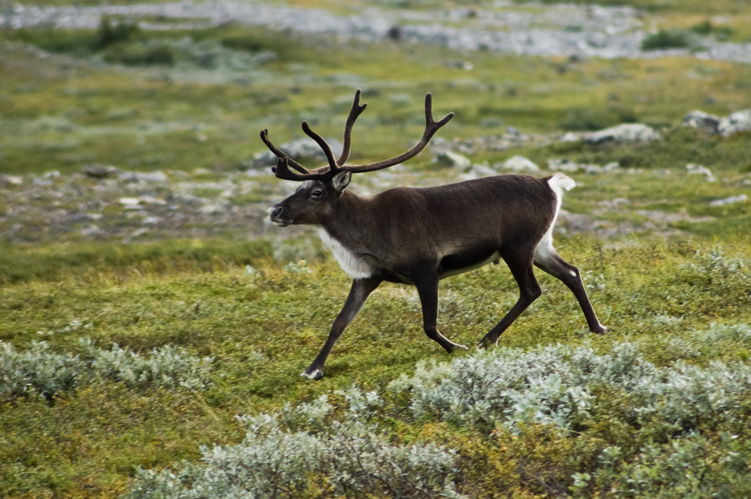 Strolling reindeer (Rangifer tarandus) in the Kebnekaise valley, Lappland, Sweden.